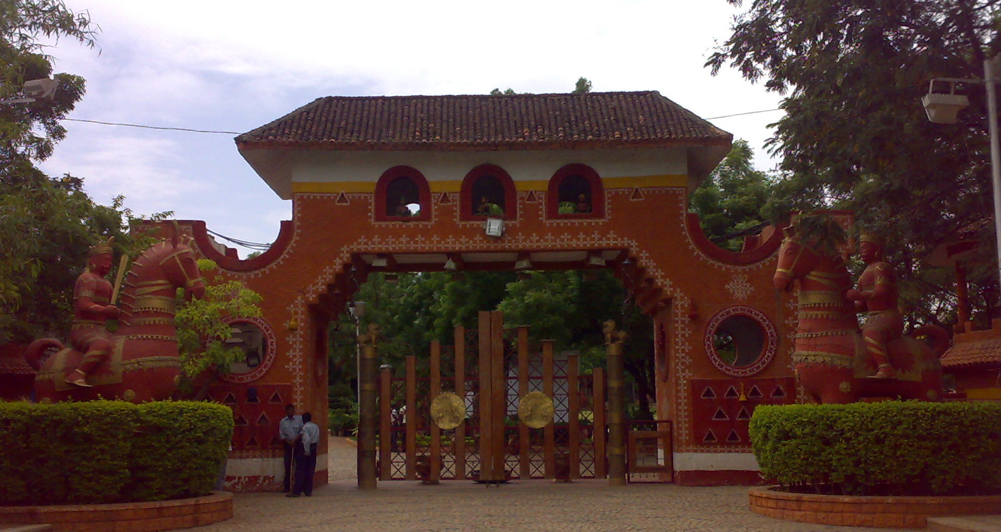 హైదరాబాదులోని శిల్పారామం ముఖ ద్వారం